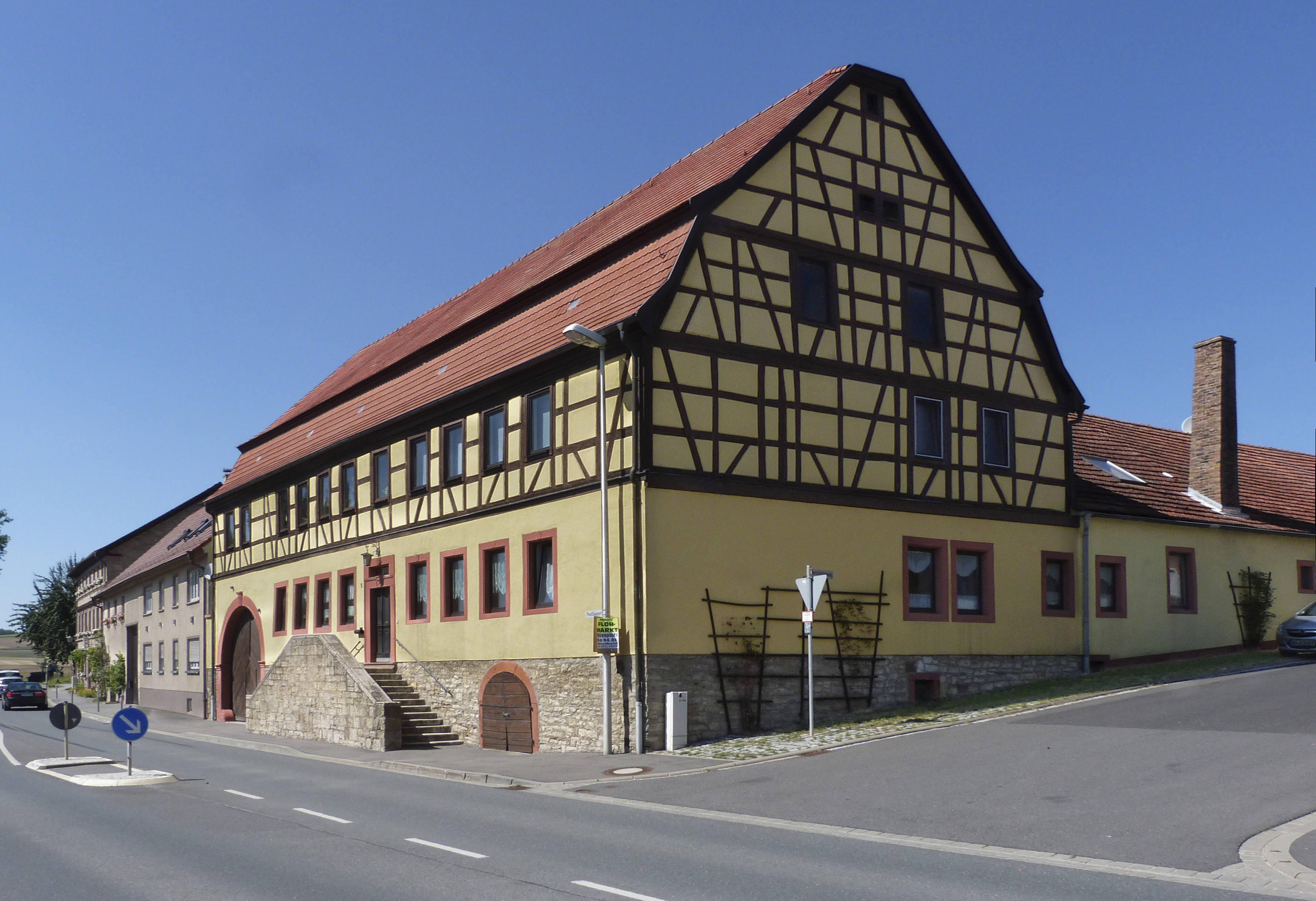 Ehemalige Poststation in Rossbrunn, Unterfranken